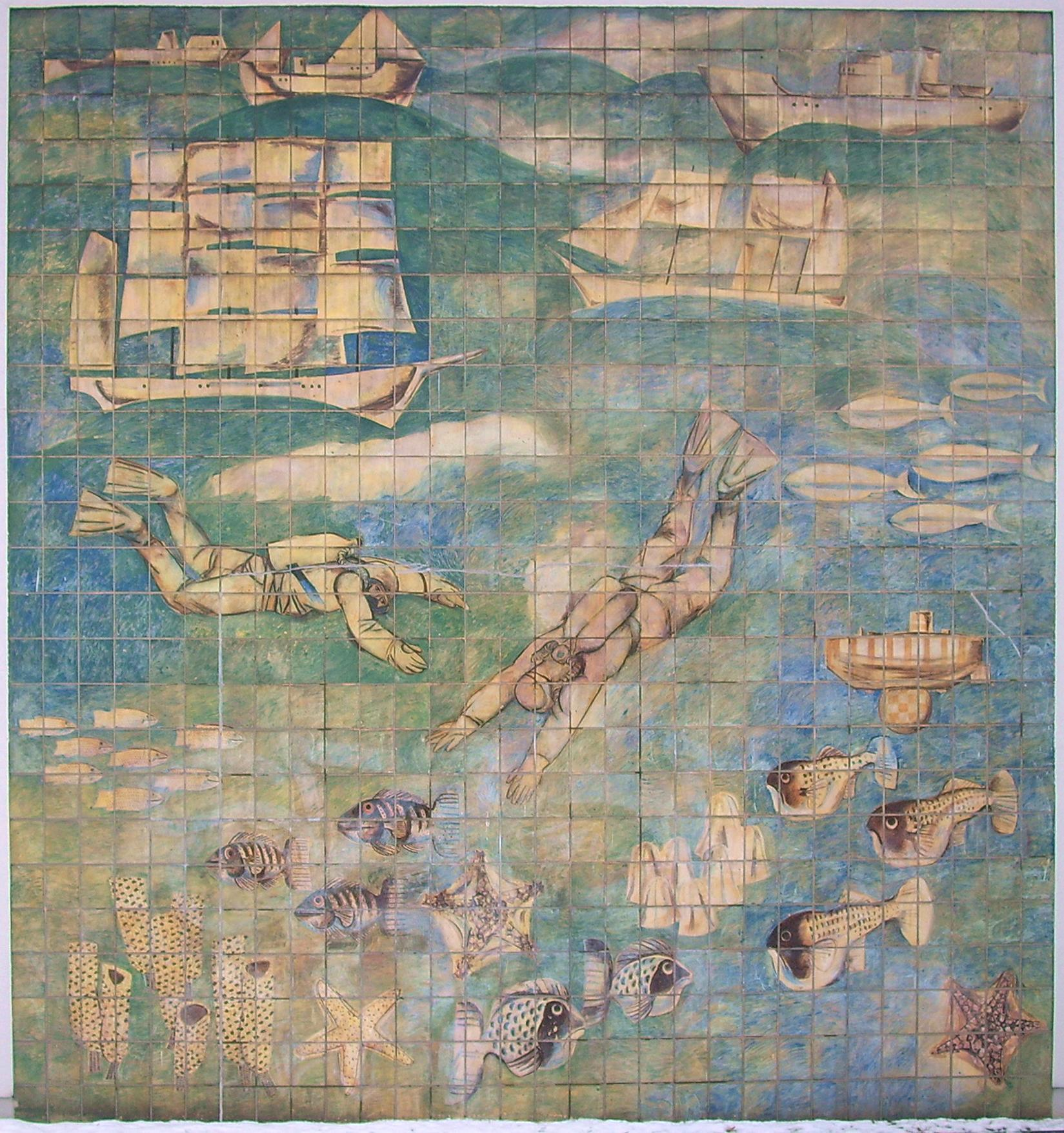 Wandbild am Gebäude Kolpingstraße 40 in Hoyerswerda